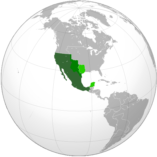 Mapa de la Republica Centralista de Mexico en 1843. Verde Claro: Territorio de Texas y Yucatan independizados. Mexico nunca reconocio la independencia de Texas y de Yucatan, seguia reclamandolo el territorio como suyo. Verde Medio: Territorio reclamado por Texas bajo control de Mexico. Verde Oscuro: Mexico.